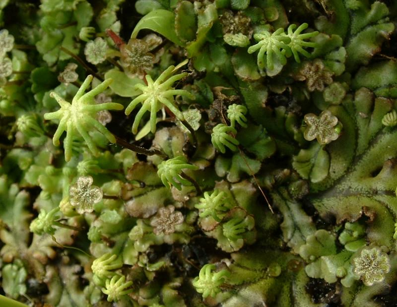 Marchantia, photo , Acorus (jardin aquatique) Autoreille.